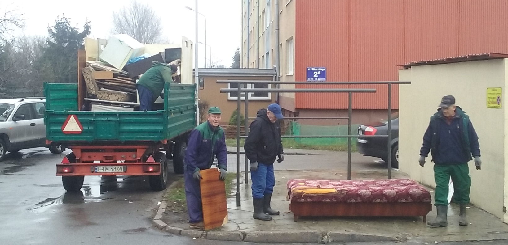 Odbiór odpadów gabarytowych w 60-tysięcznym Tomszowie Mazowieckim, w województwie łódzkim